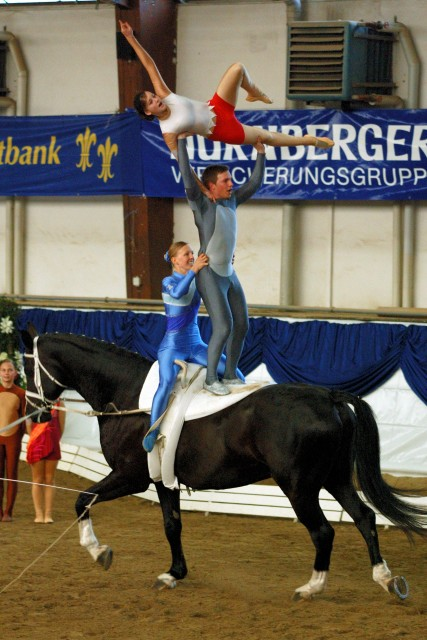 Voltigieren, S-Gruppe München-Daglfing 1